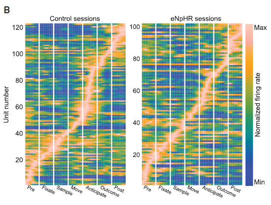 OFC neuron activity vSub supression